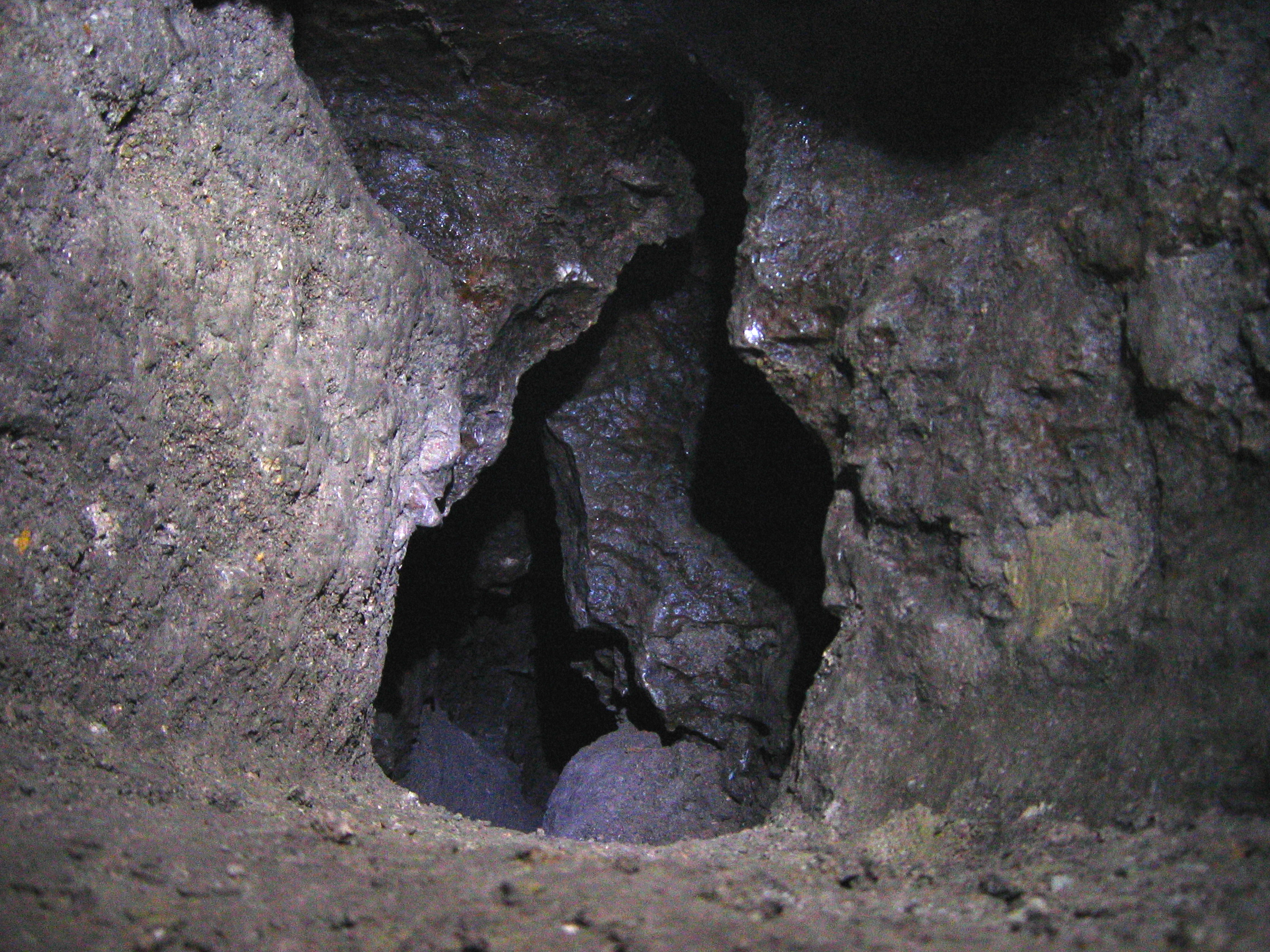 zolushka cave excavations